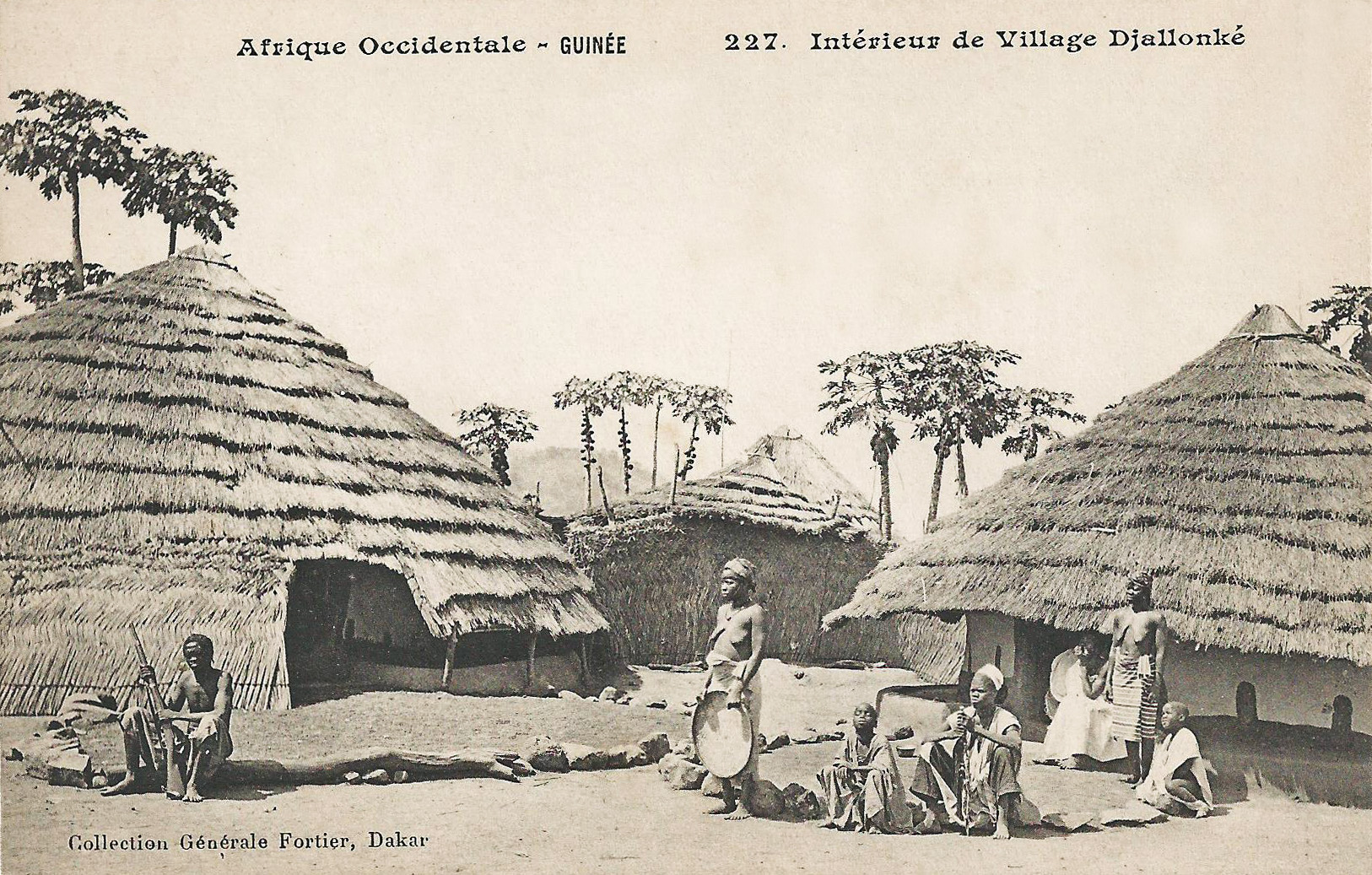 François-Edmond Fortier, Intérieur de village Djallonké. Afrique Occidentale. Guinée